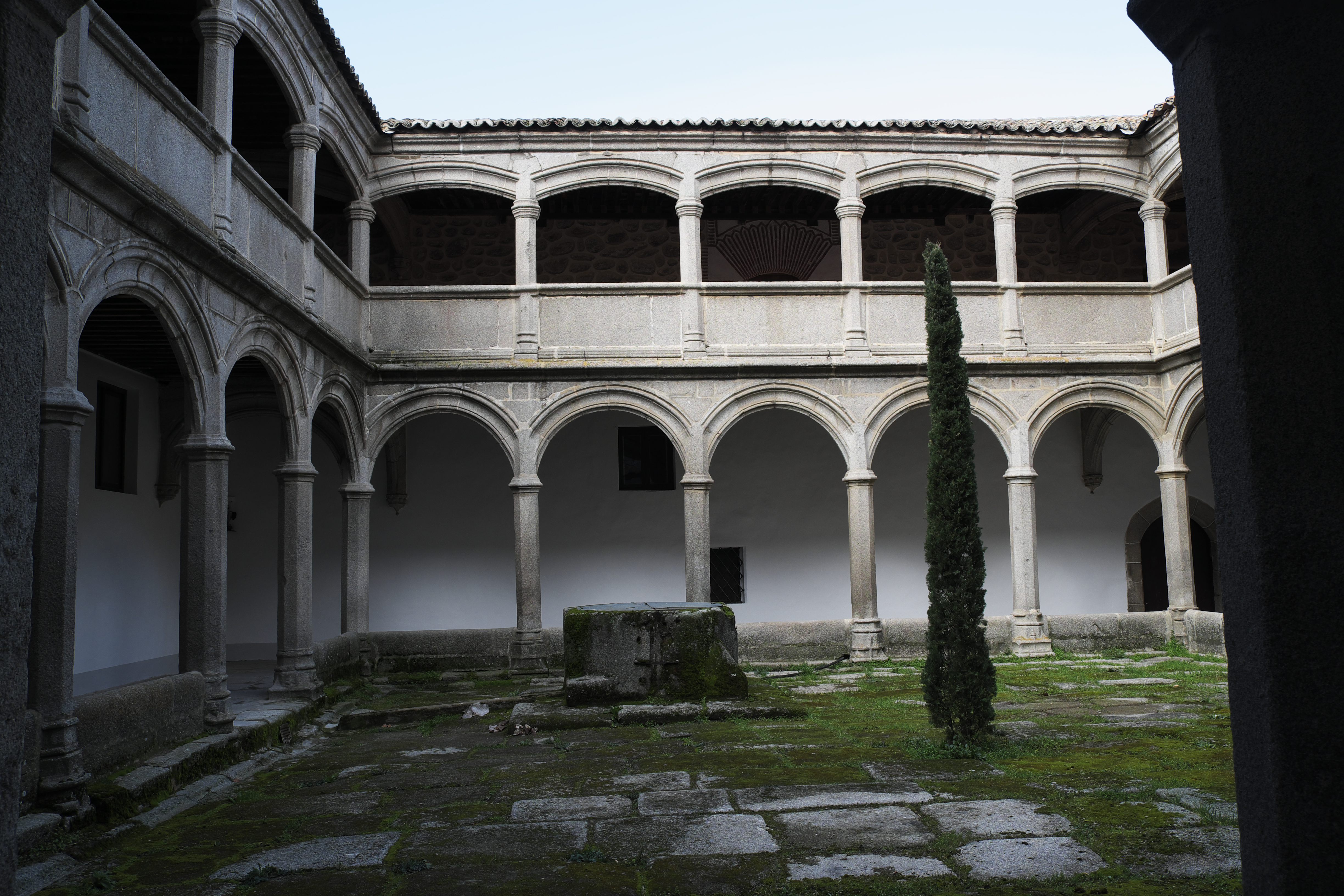 Dominikanerkloster Real Monasterio de Santo Tomás in Ávila (Kastilien-León/Spanien), Claustro de les Novicios (Kreuzgang der Novizen)